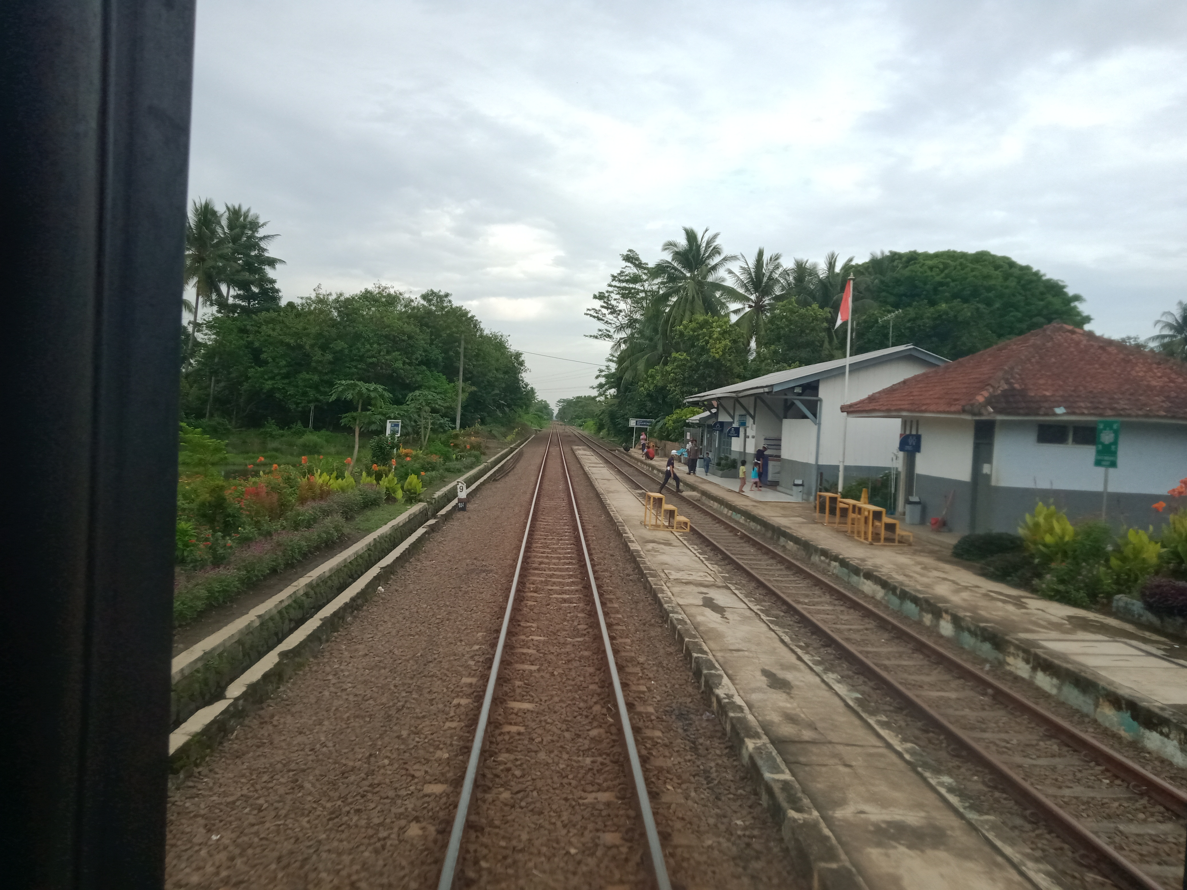 Stasiun Walantaka, 2020